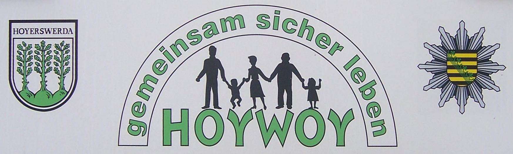 Aktionsbanner der Stadt Hoyerswerda und der sächsischen Polizei mit der Beschriftung „Hoywoy“ und „gemeinsam sicher leben“, fotografiert von einer Busrückseite in Hoyerswerda.